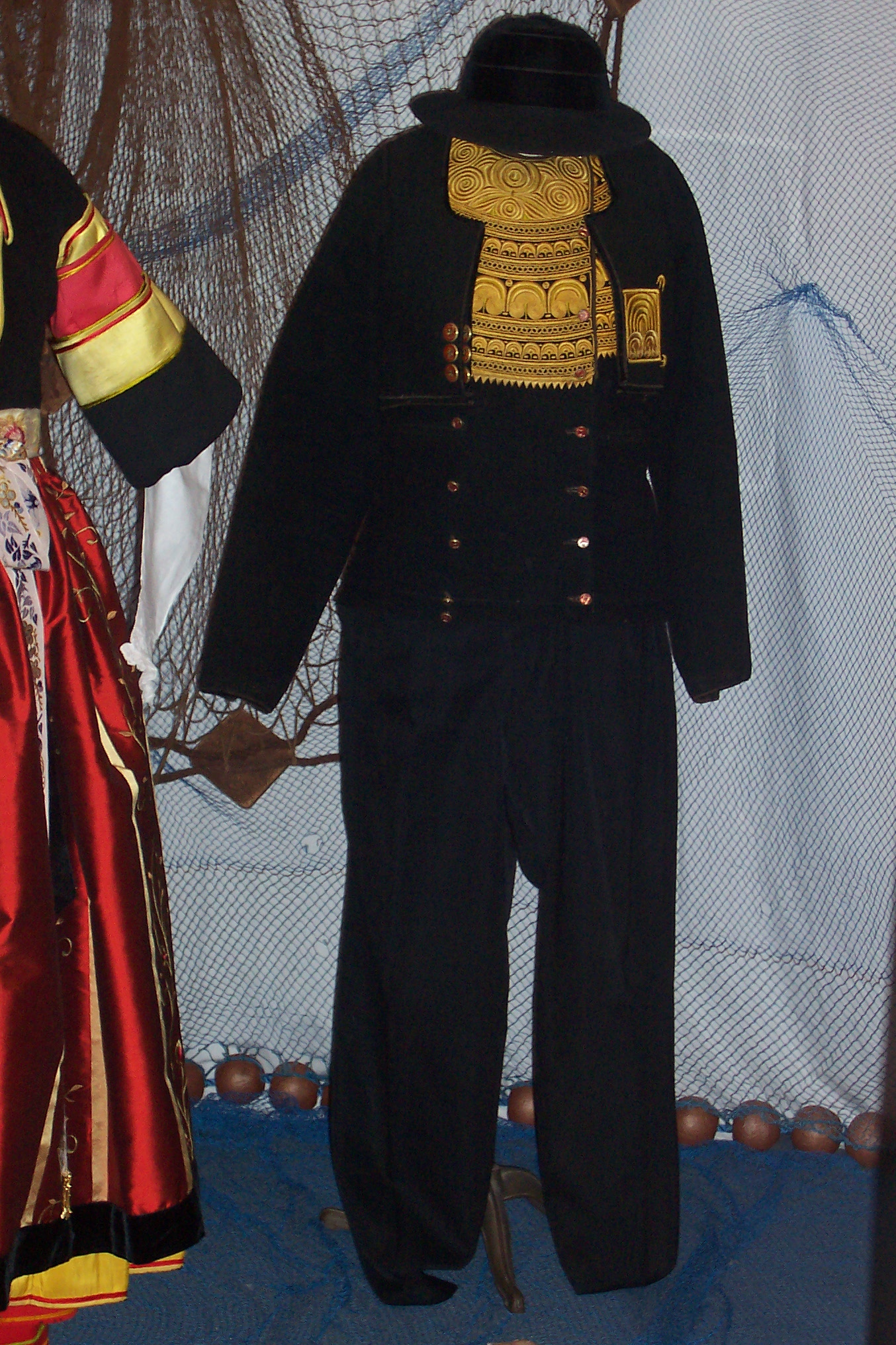 Provisoire pour identification